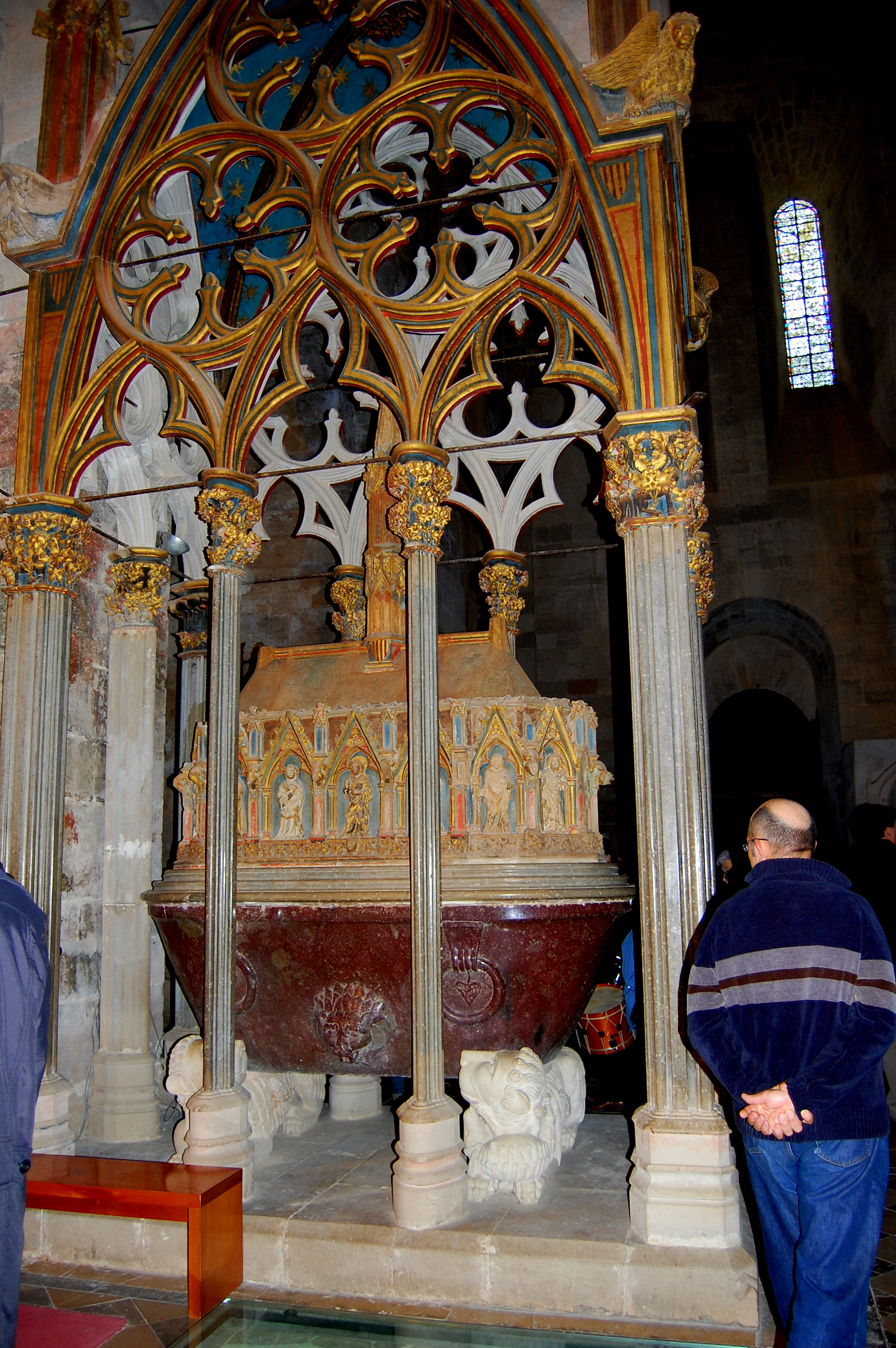 Monestir de Santes Creus (Aiguamúrcia)